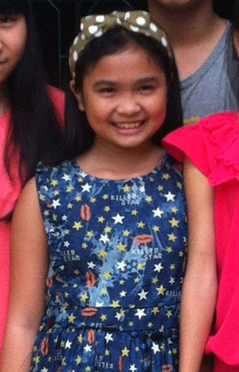 Thiện Nhân trước ngày lên đường vào Sài Gòn nhập học